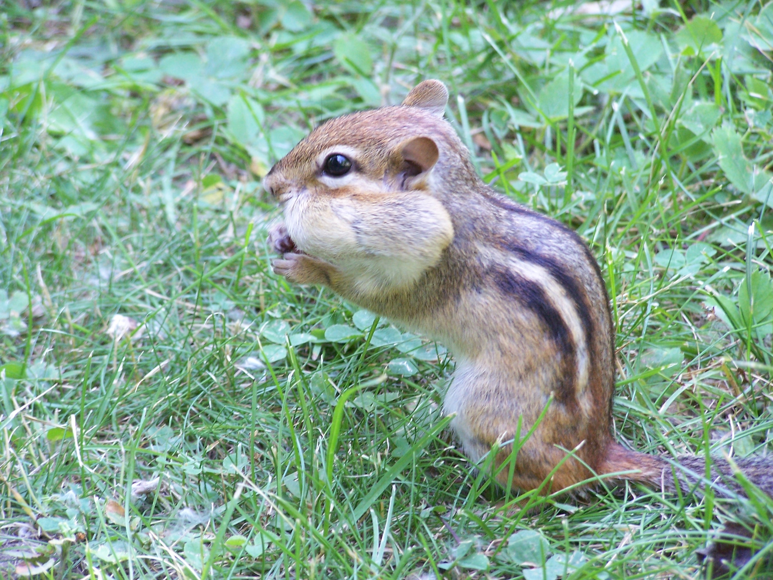 Tamia rayé vu de profil avec l'abajoue gonflée par une gousse d'arachide